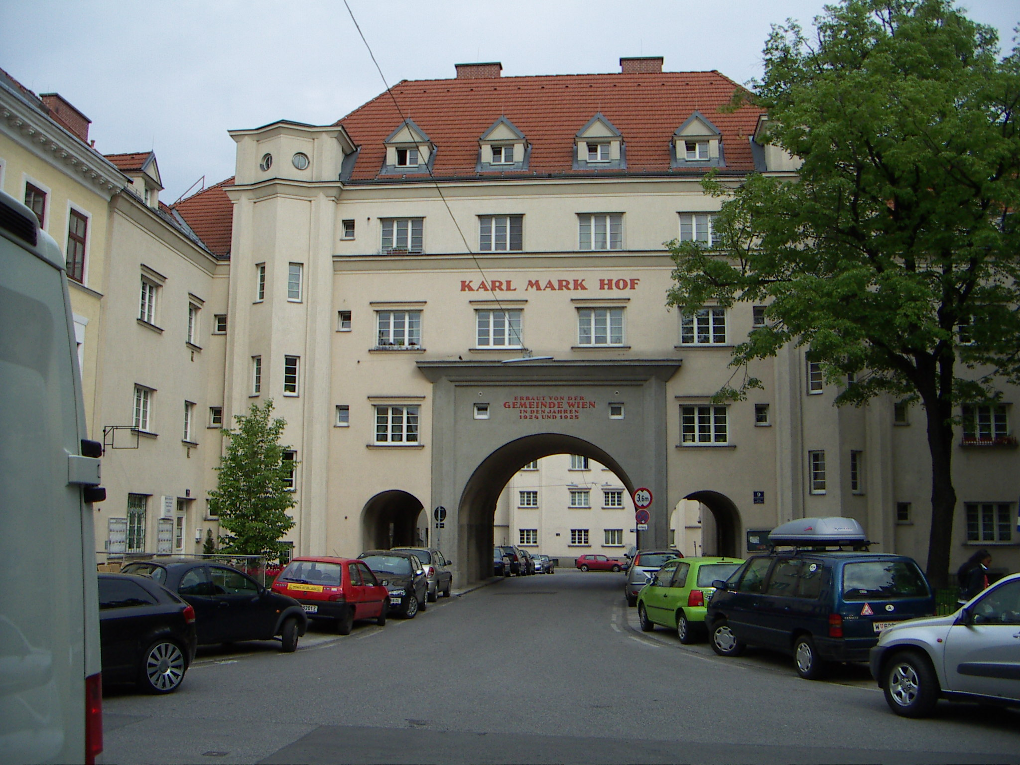 Karl-Mark-Hof, Karl Mark 1900 - 1991, 1190 Vienna